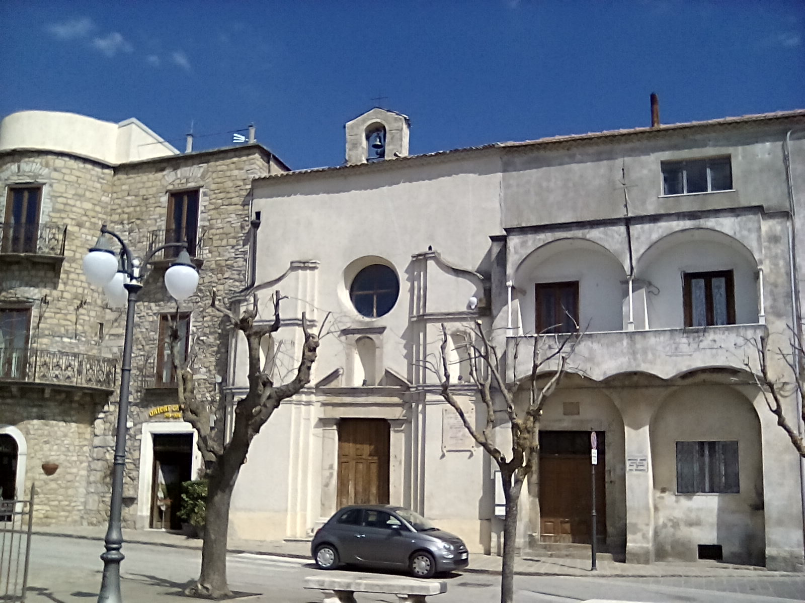 La chiesa e l'annesso convento di Sant'Antonio a Vaglio Basilicata (PZ)